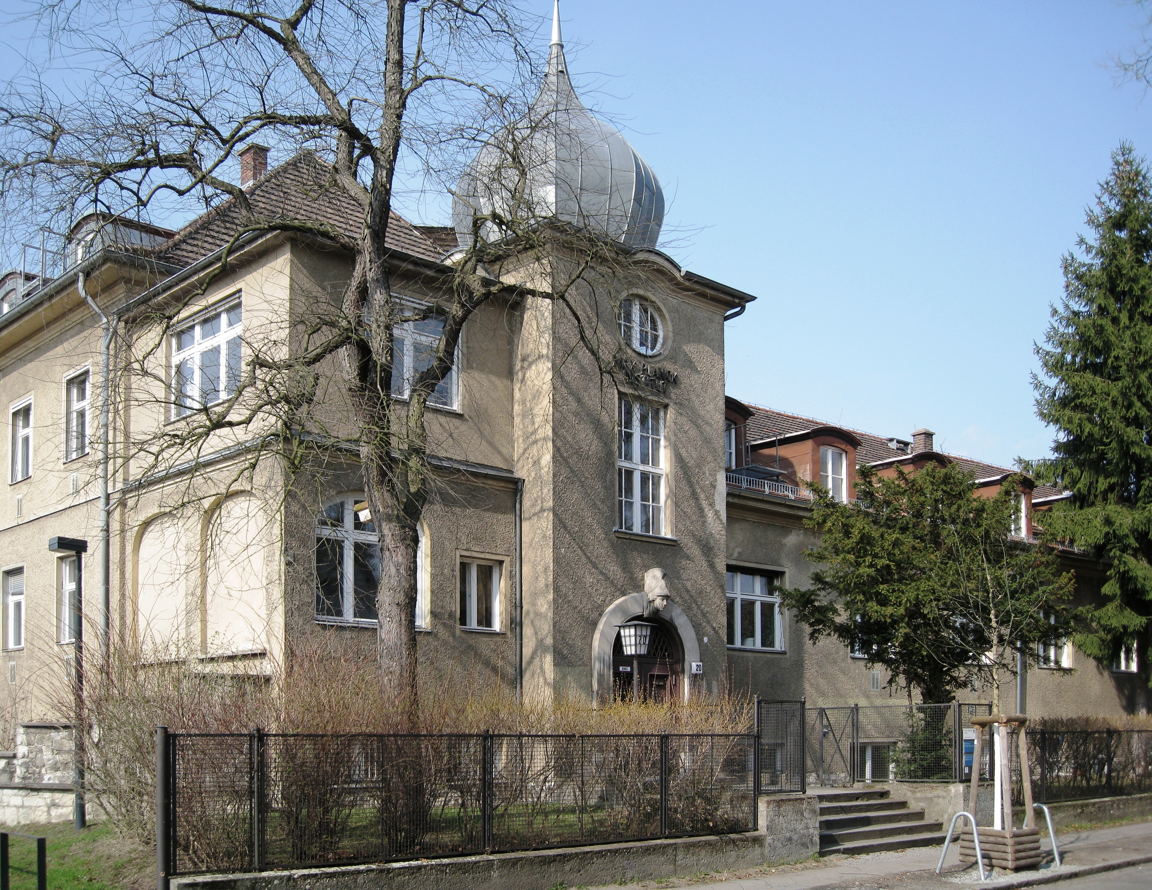 Institutsgebäude